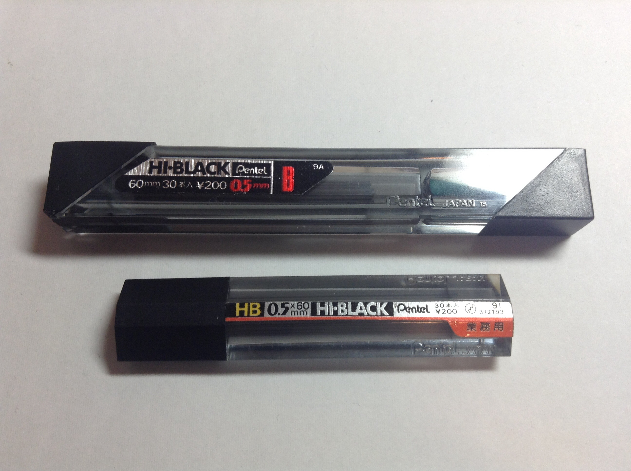 ぺんてるのシャープ芯ハイブラック